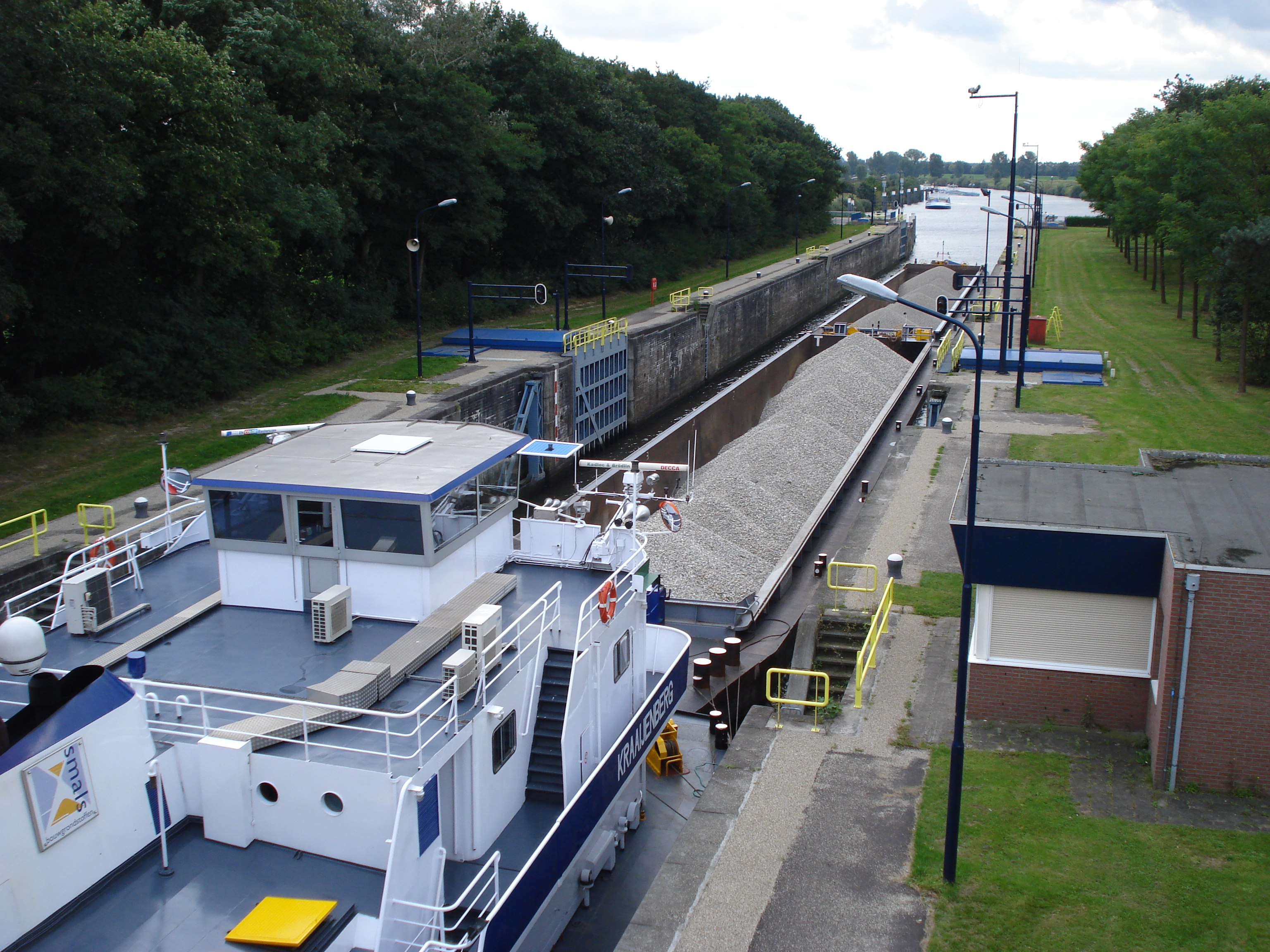 Heumen(Gld,NL),duwboot Kraaijenberg in sluis Maaswaalkanaal, met twee bakken ervoor. Afmetingen: 32 x 12,49 x 2,03 meter Bouwjaar 1971 Werf van aanbouw: Werf Ruhrorter Schiffswerft in Duisburg Aandrijving: ABC 2 x 2200 pk Vorige namen: Herkules II, Herkules, Lehnkering 17, Lehnkering 17-Kevin Europanummer 2326115